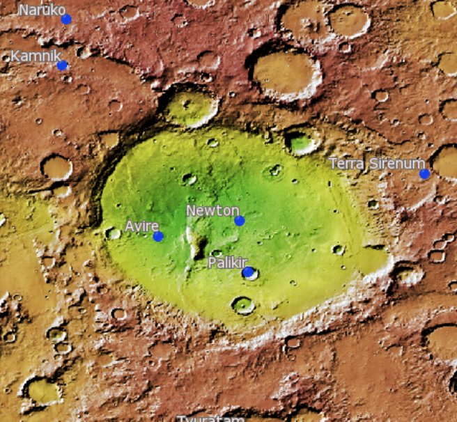 Cráter marciano Newton. (Imagen IAU/USGS/Goddard/A SU/USGS)